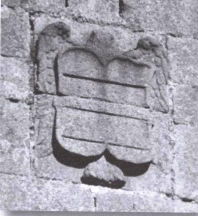 Escudo de armas del IV Conde de Feria